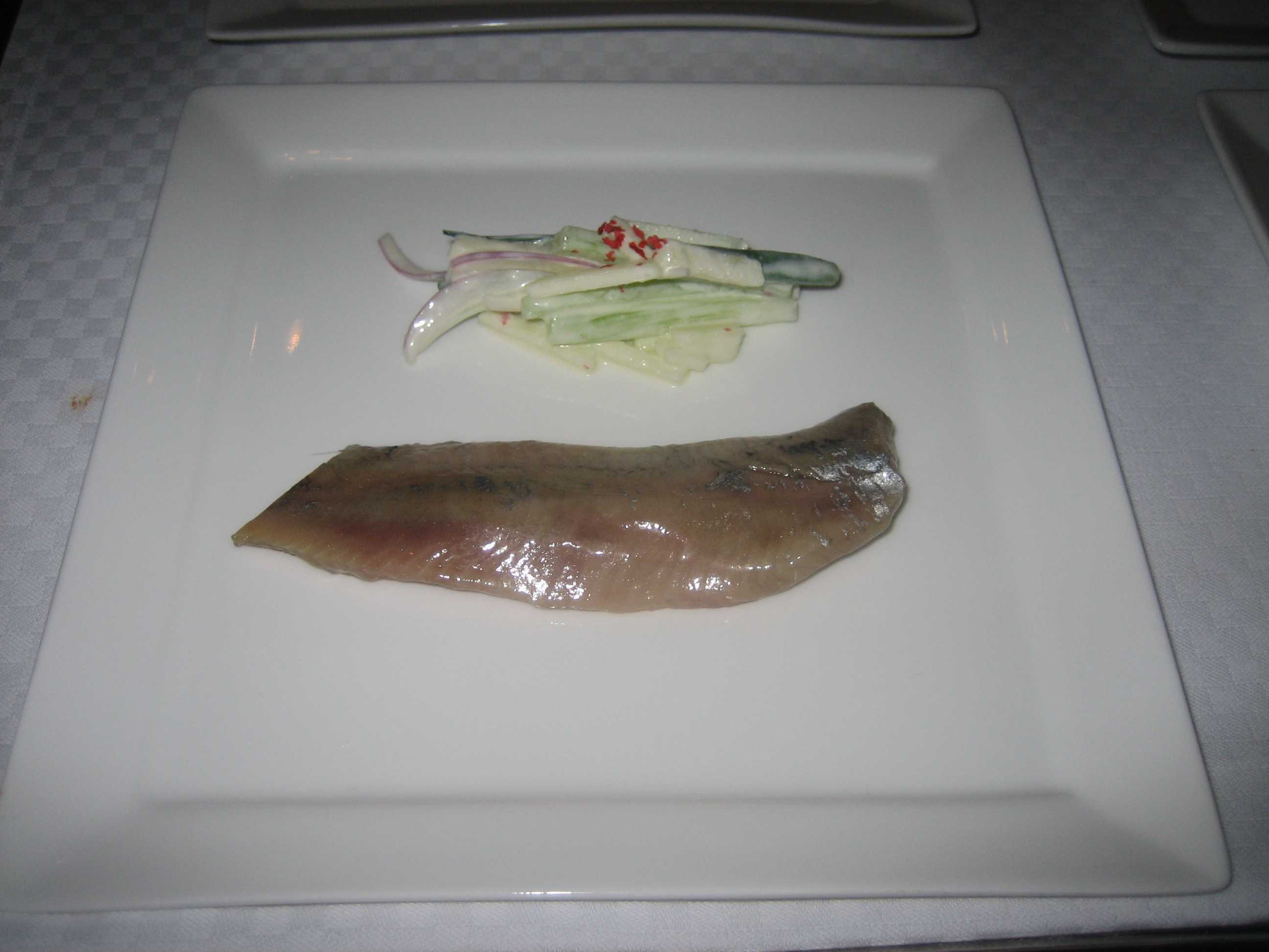 dish with herring